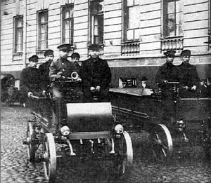 Грузовики "Фрезе и К"